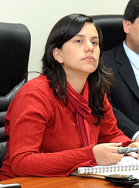 Verónika Mendoza, psicóloga y política peruana. Congresista de la República del Perú para el período 2011-2016 por la región de Cusco. Actualmente es candidata a la presidencia de la República por el Frente Amplio.